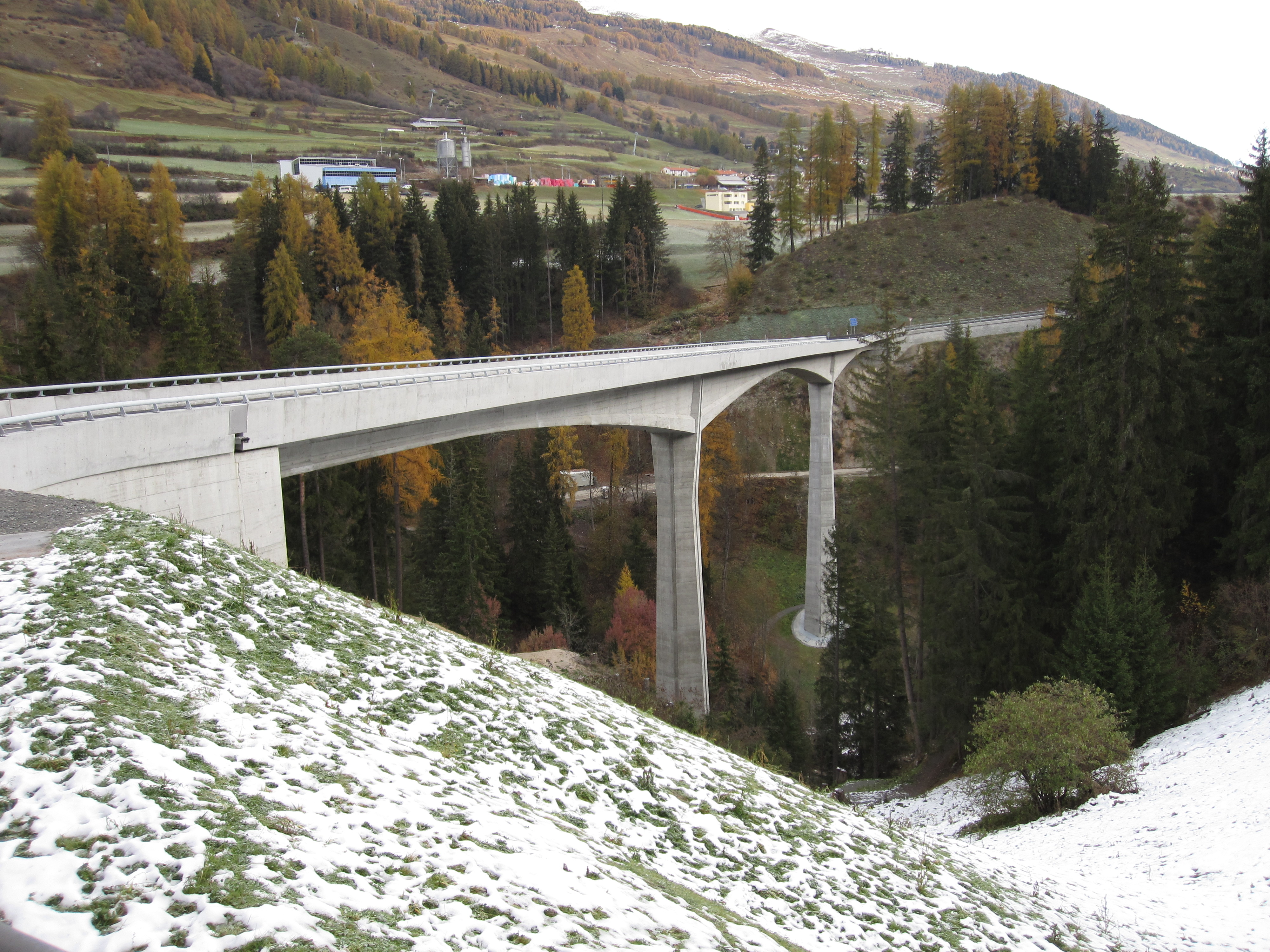 Innbrücke bei Tarasp-Vulpera im Unterengadin (Kanton Graubünden), nahe Scuol